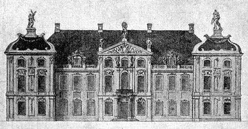 Czapski Palace in Warsaw (1713-1718).